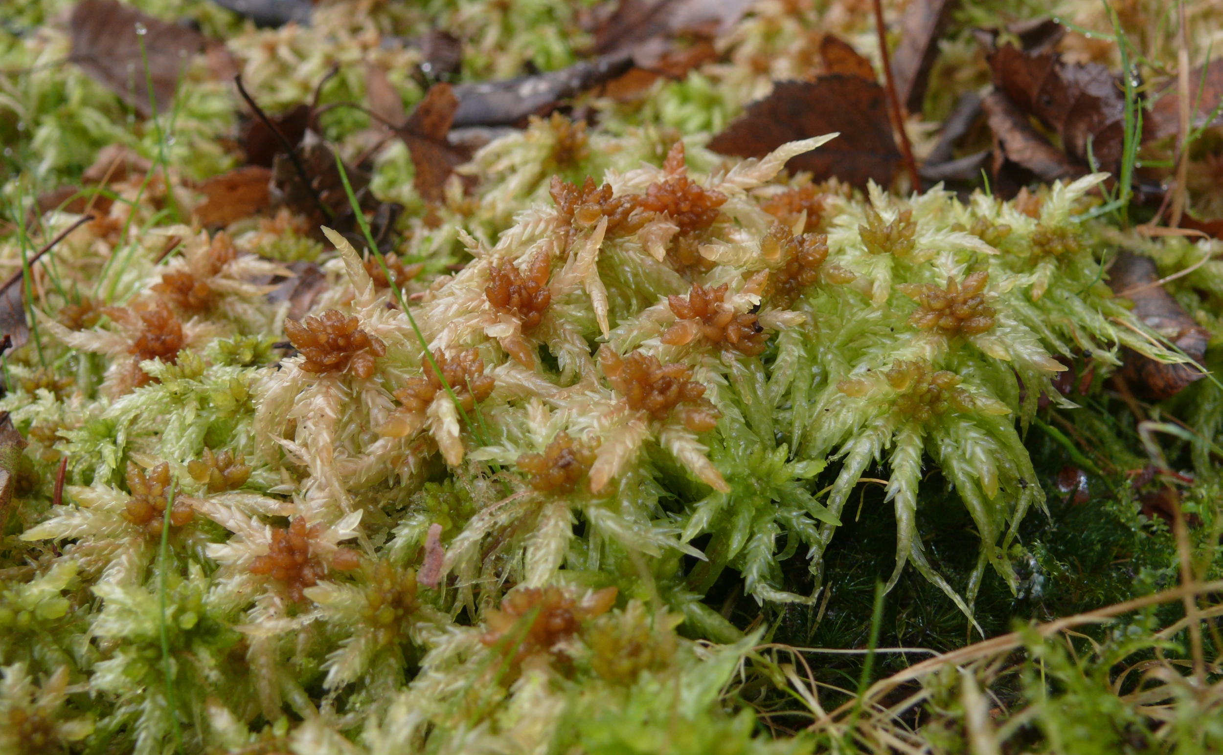 Sphagnum palustre, Schwäbisch-Fränkische Waldberge, Germany